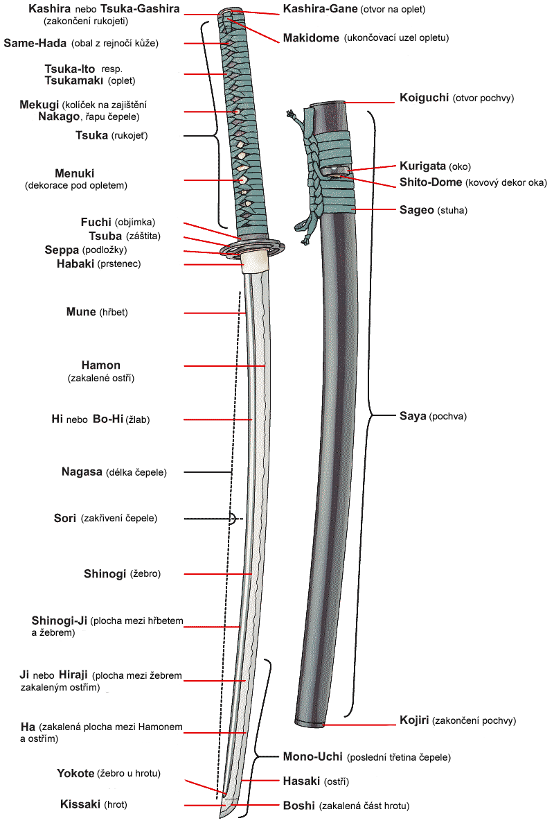 Schema a popis casti katany